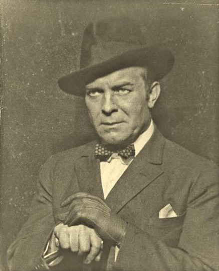 Miloš Nový (1879 - 1932), Český režisér a herec.